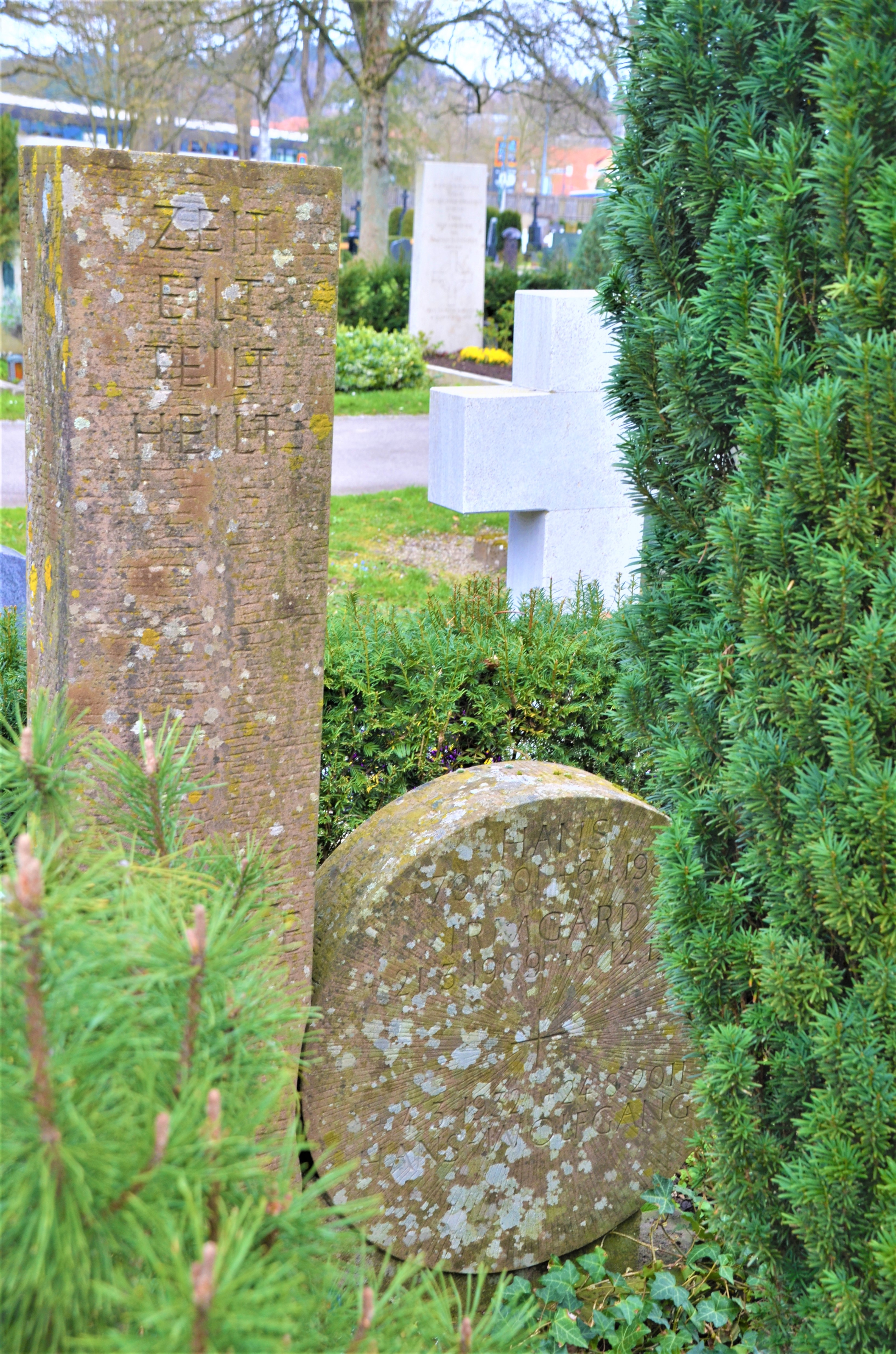 Grabmal von Studienprofessor Hans-Wolfgang Bächle auf dem Leonhardsfriedhof Schwäbisch Gmünd